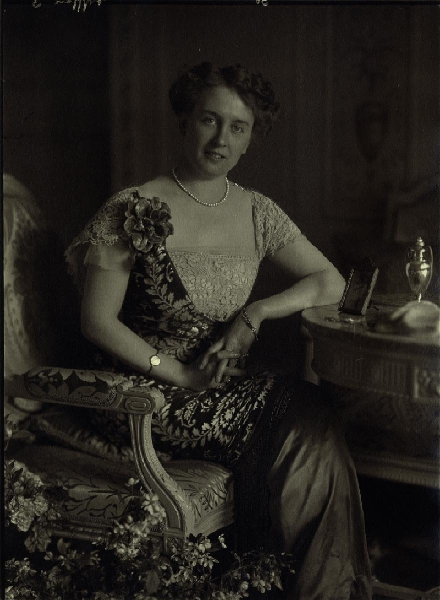 Portrait von Amélie Thyssen (1877–1965). Gelatinesilberabzug, um 1910.